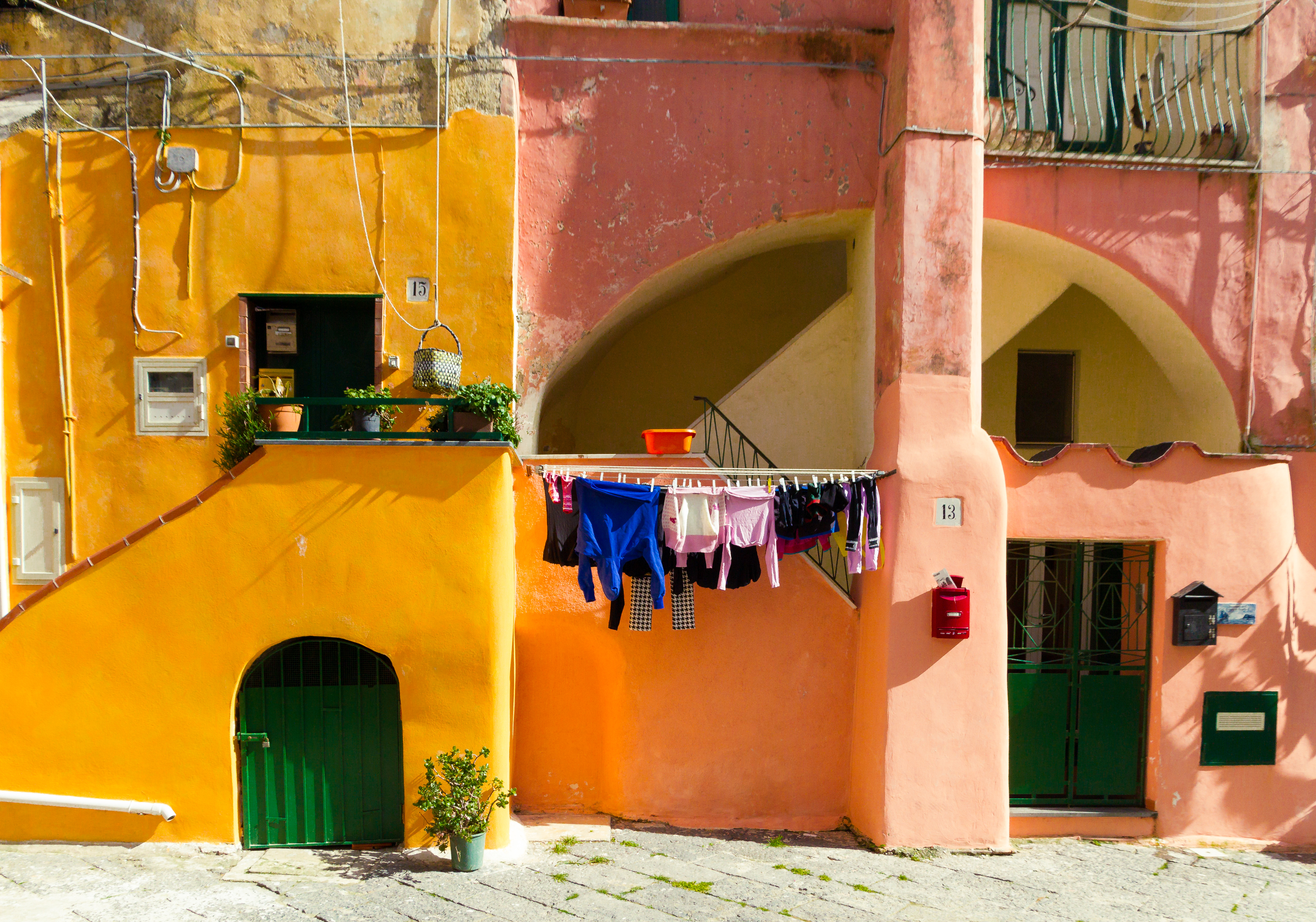 Procida-Casale Vascello